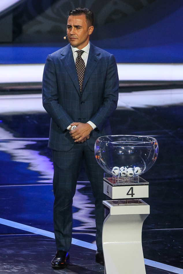 Лопырева, Роналдиньо и Марадона. В Москве прошла жеребьевка ЧМ-2018